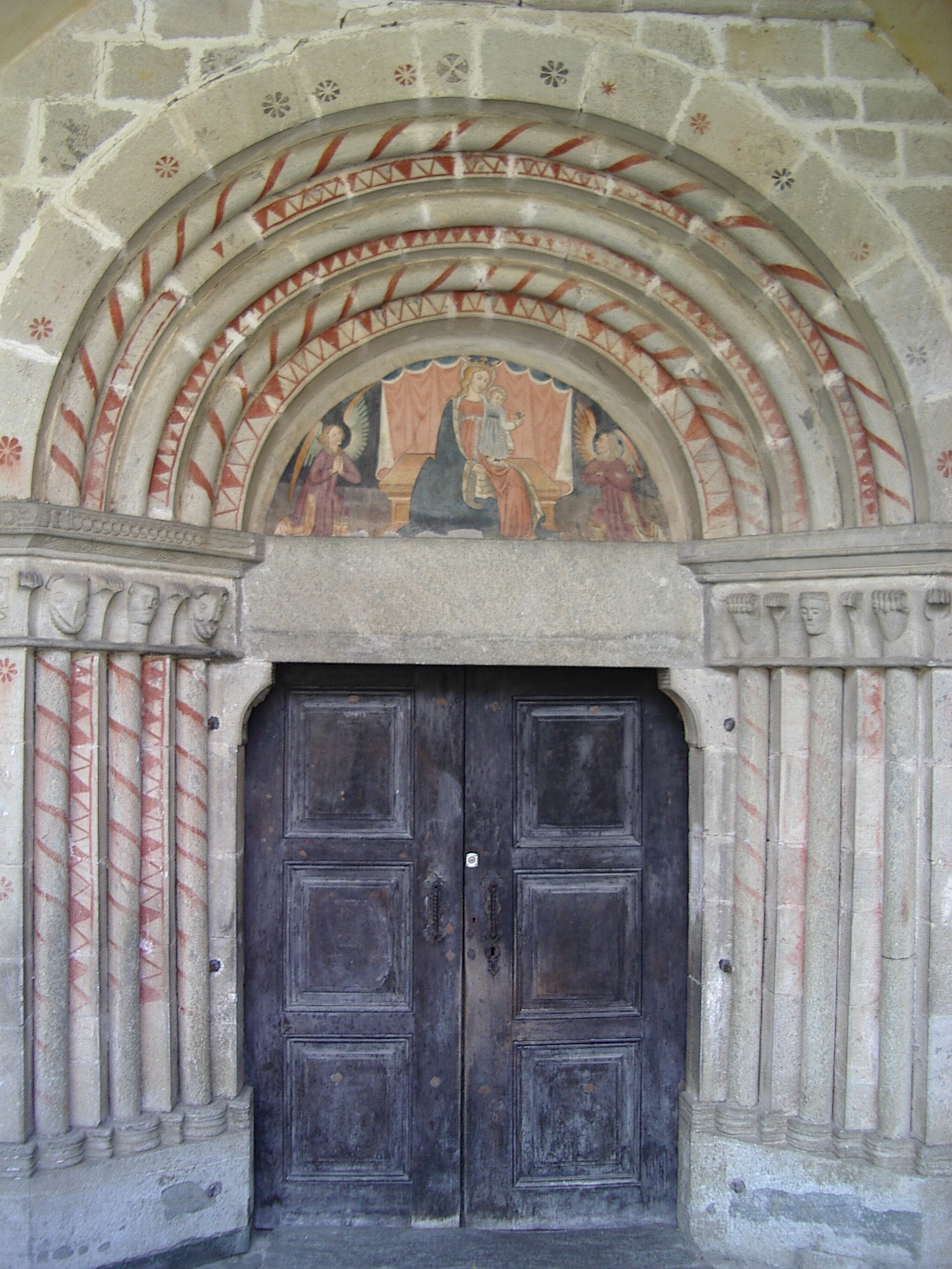 église paroissiale de santa Maria Assunta di Elva : Portail avec lunette (fresque :La Vierge et l'Enfant et Anges trônant attribuée à Giovanni Baleison)